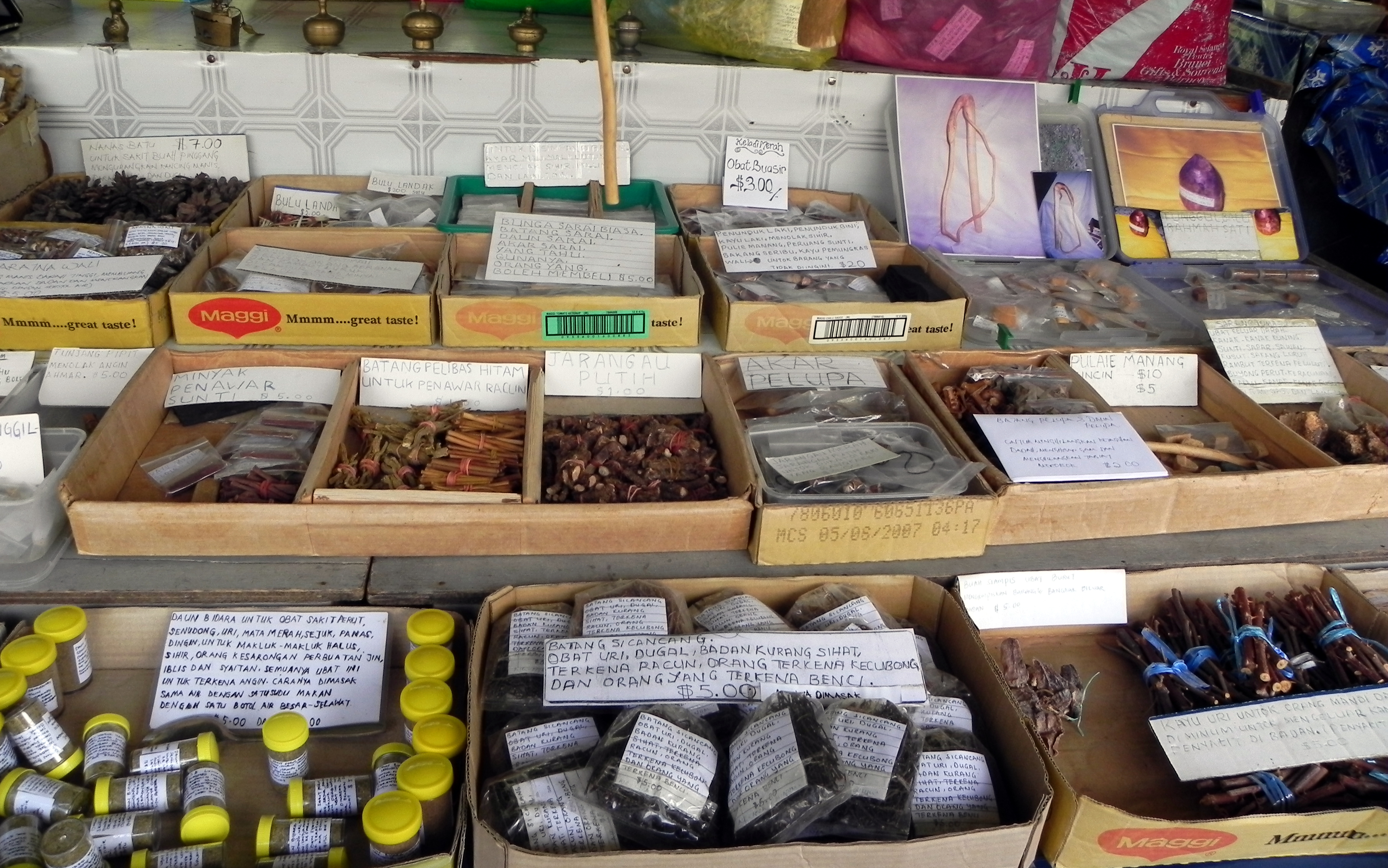 Heilkräuter und ähnliches auf dem Tamu (Open Market) in Bandar Seri Begawan